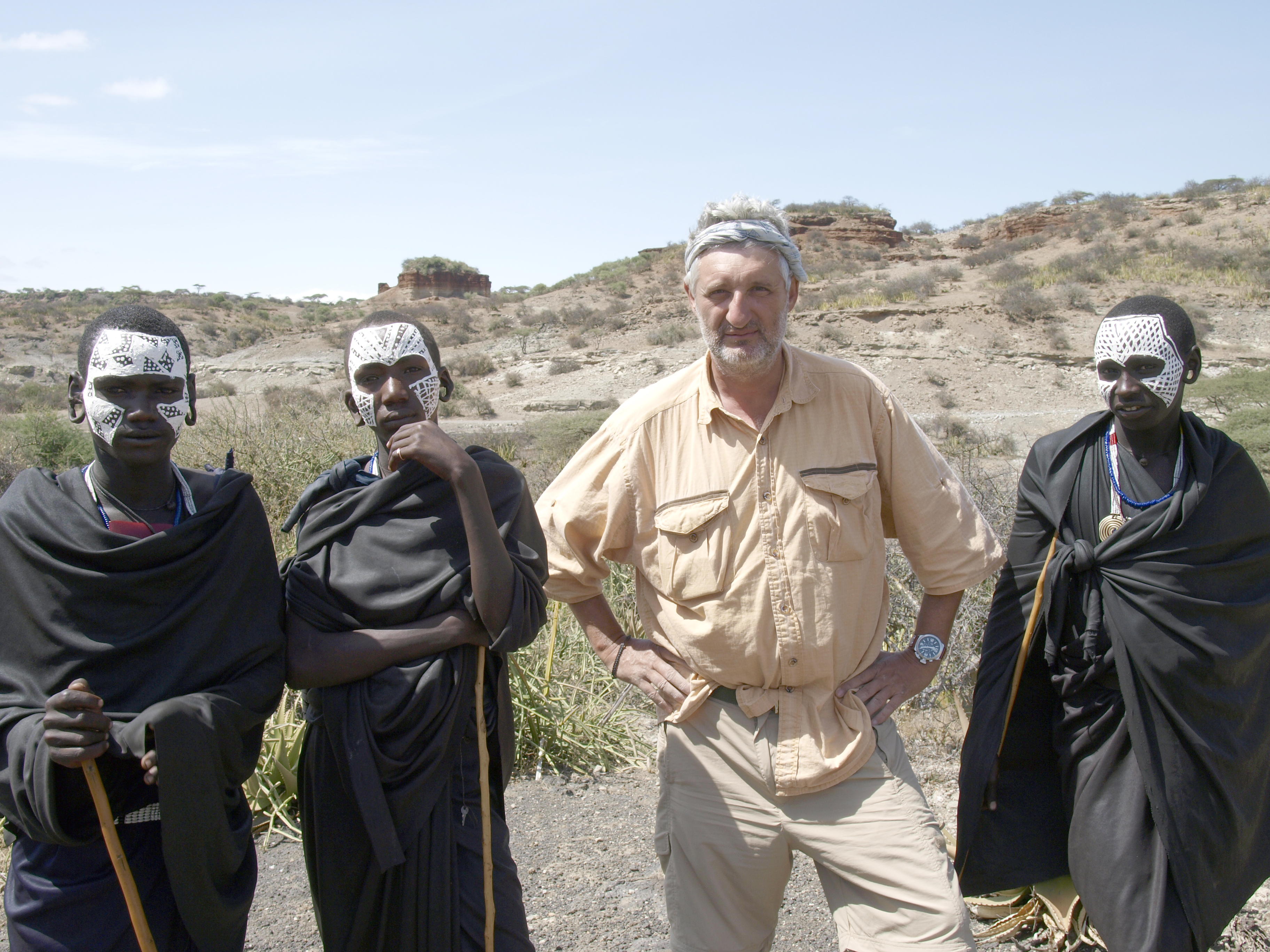 Enrique Baquedano posando con guerreros Masáis Morani en la Garganta de Olduvai (Tanzania) Junio de 2012. Foto tomada por Javier Trueba